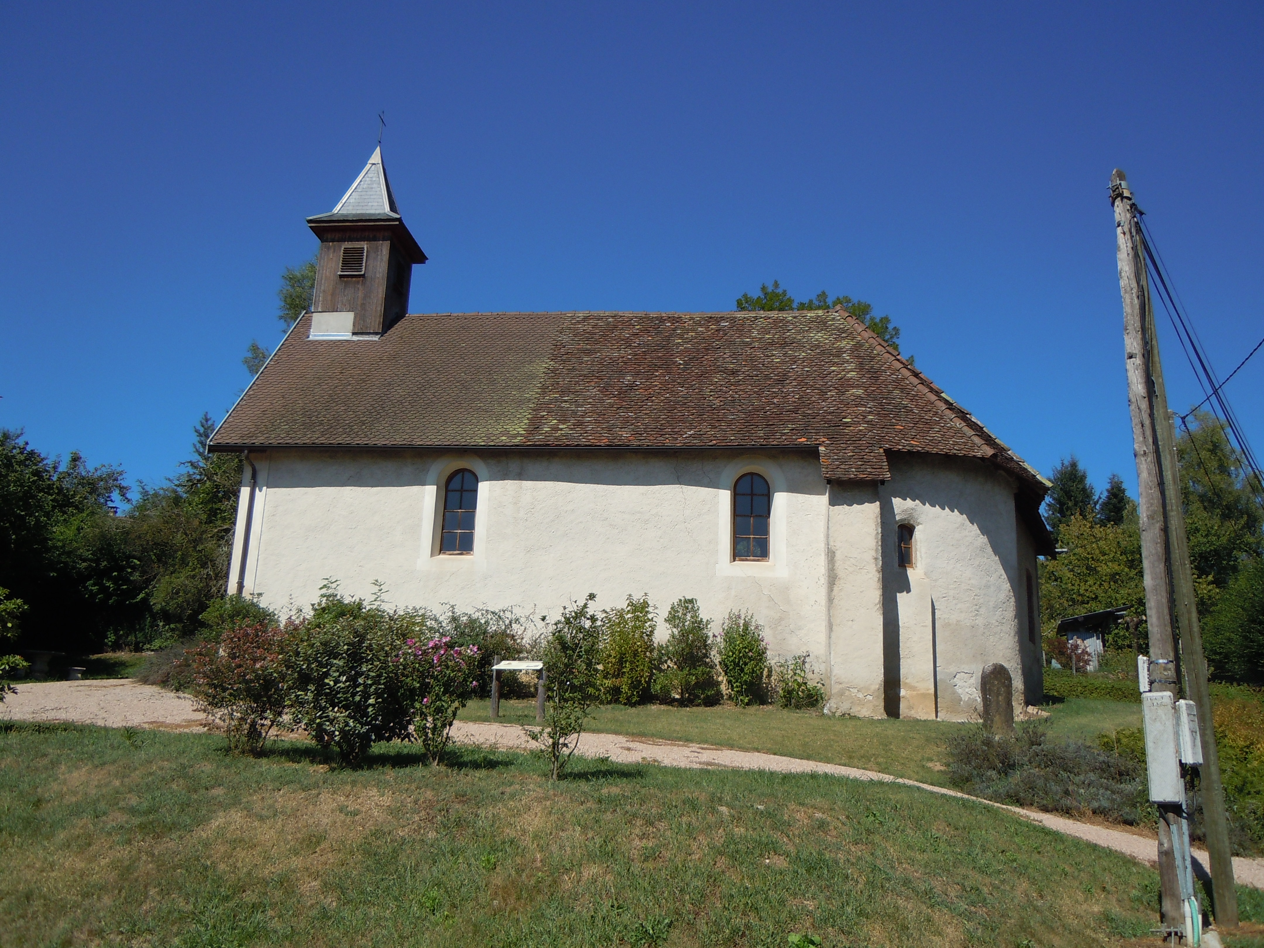 Chapelle de Tramonet - Belmont Tramonet - Savoie